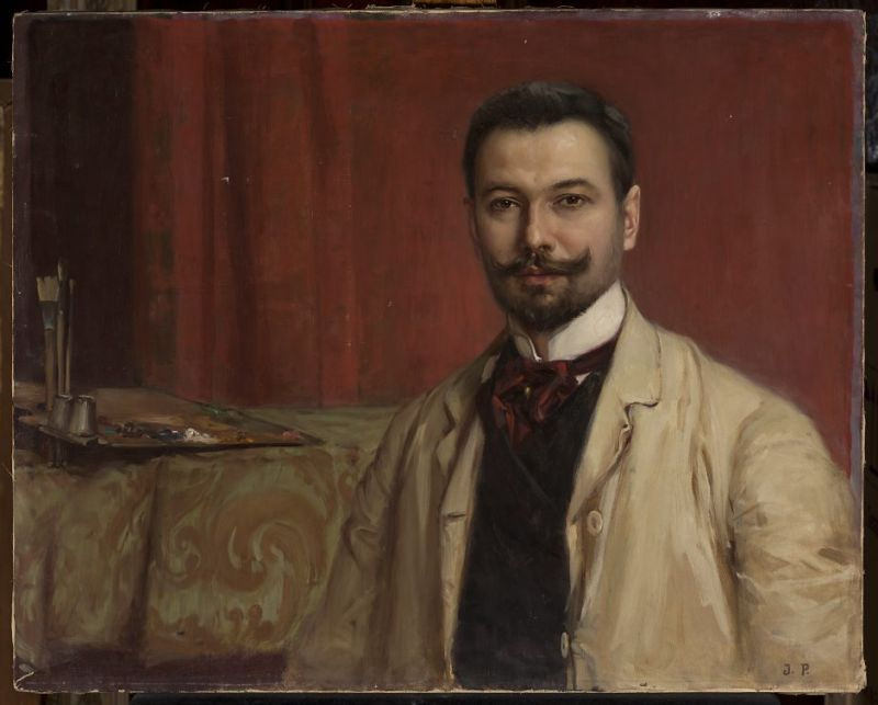 Autoportret